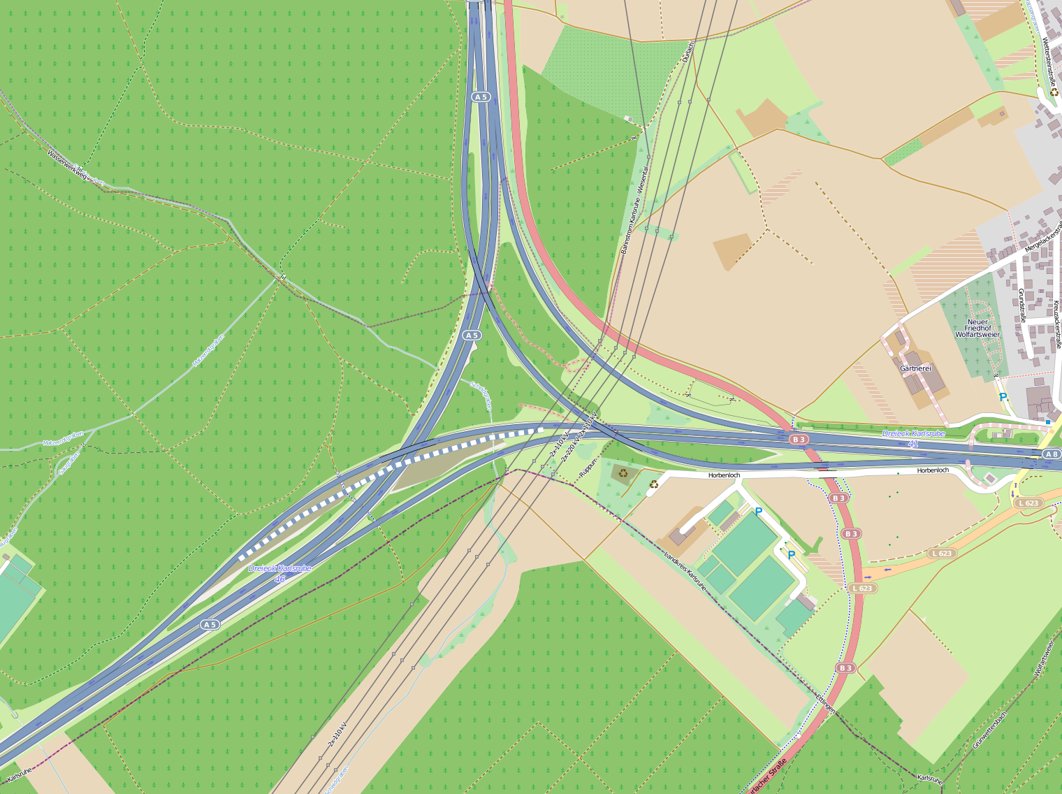 Lage des Autobahndreiecks Karlsruhe (A8/A5) bei Karlsruhe.